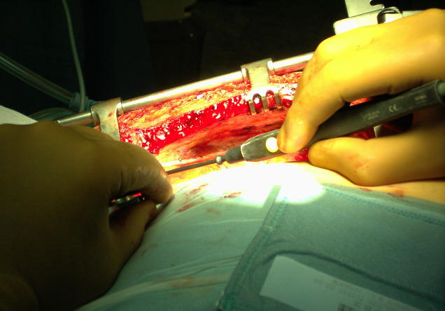 lat.arteria mammaria internanın preparasiyası. Preparation arteria mammaria interna.JPG